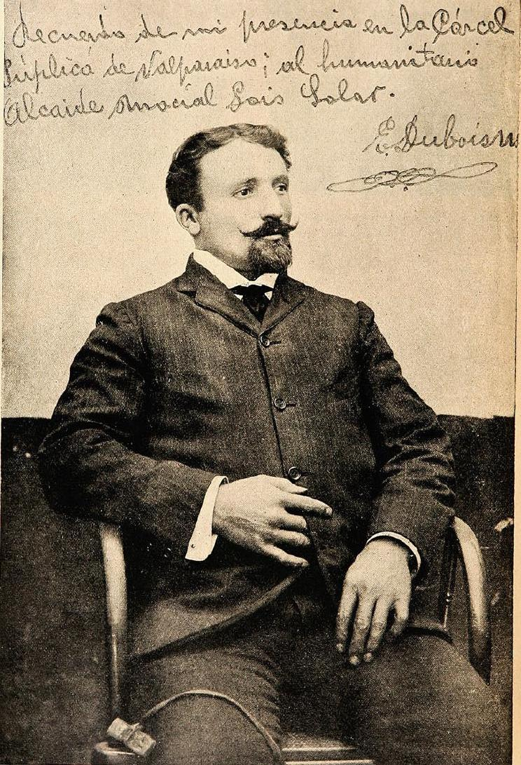 Louis Amadeo Brihier Lacroix, también conocido por sus alias Émile Dubois, Emilio Dubois, Émile Murraley o Emilio Morales (Étaples, Pas-de-Calais, Francia, 29 de abril de 1867 - Valparaíso, Chile, 26 de marzo de 1907), fue un ladrón y asesino en serie francés.